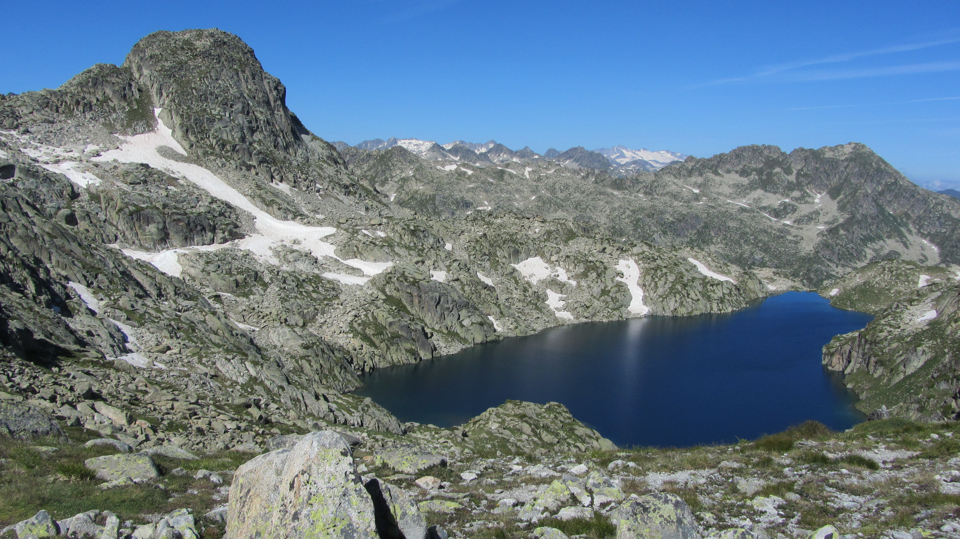 Agulha de Saboredo i Lac Glaçat des del Coll pujant al Tuc de Saboredo